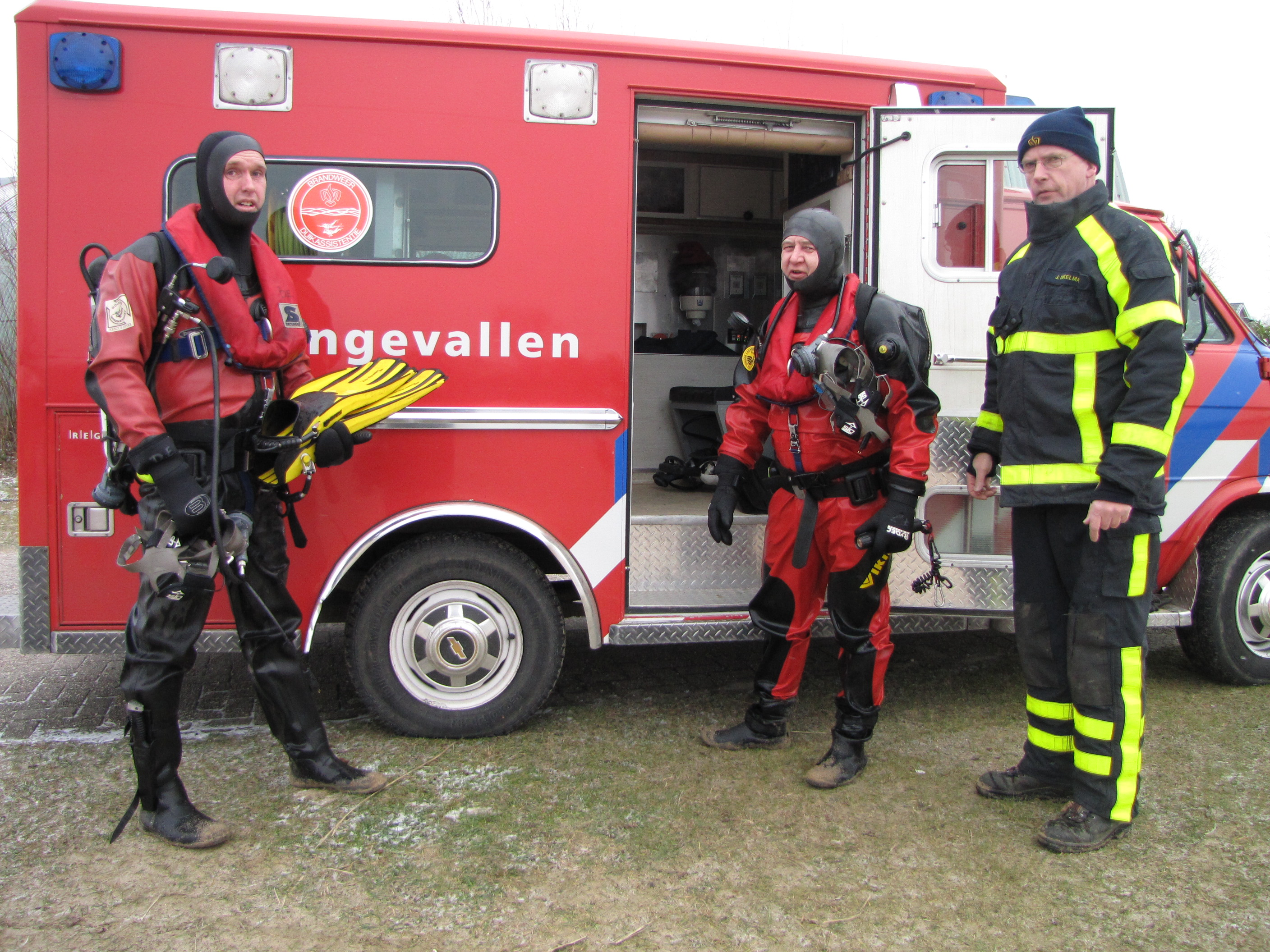 Duikers, Oude IJsselstreek